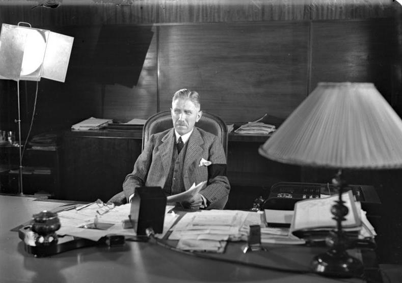 Reichskanzler von Papen spricht im Rundfunk zu dem amerik. Volk ! Reichskanzler von Papen in seinem Arbeitszimmer während der Rede zu den amerikanischen Hörern.